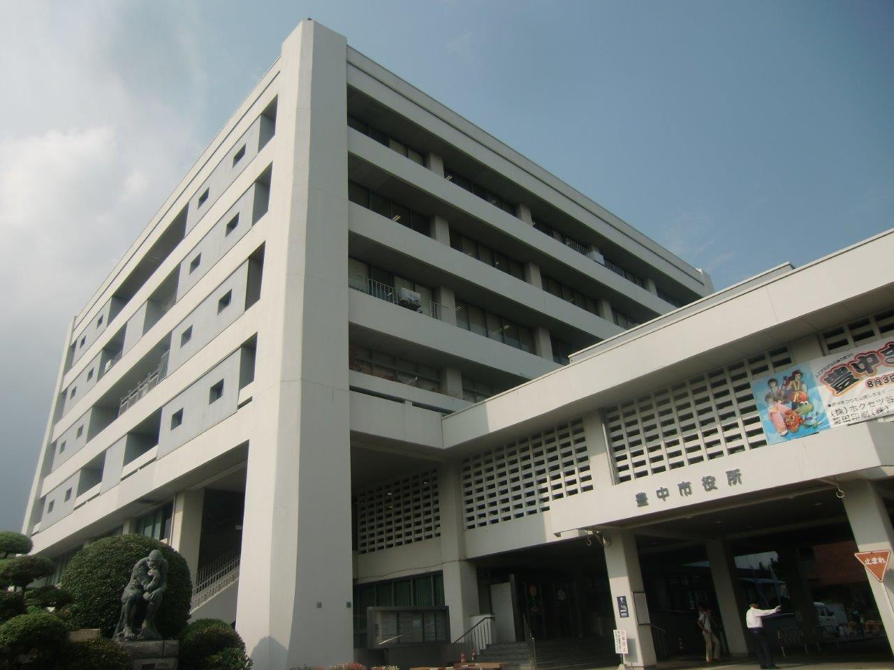 豊中市役所を国道176号線より南西方向から撮影